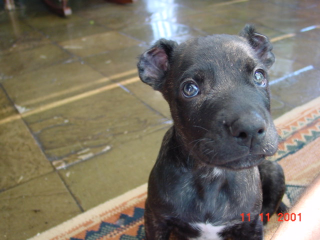 Cachorro de Cimarrón Uruguayo de 2 meses de edad. Nombre de pedigree del Ejemplar "Tanimbú (Tizón) del Diablo". Imagen personal. Se autoriza su uso citando el nombre de pedigree del animal.